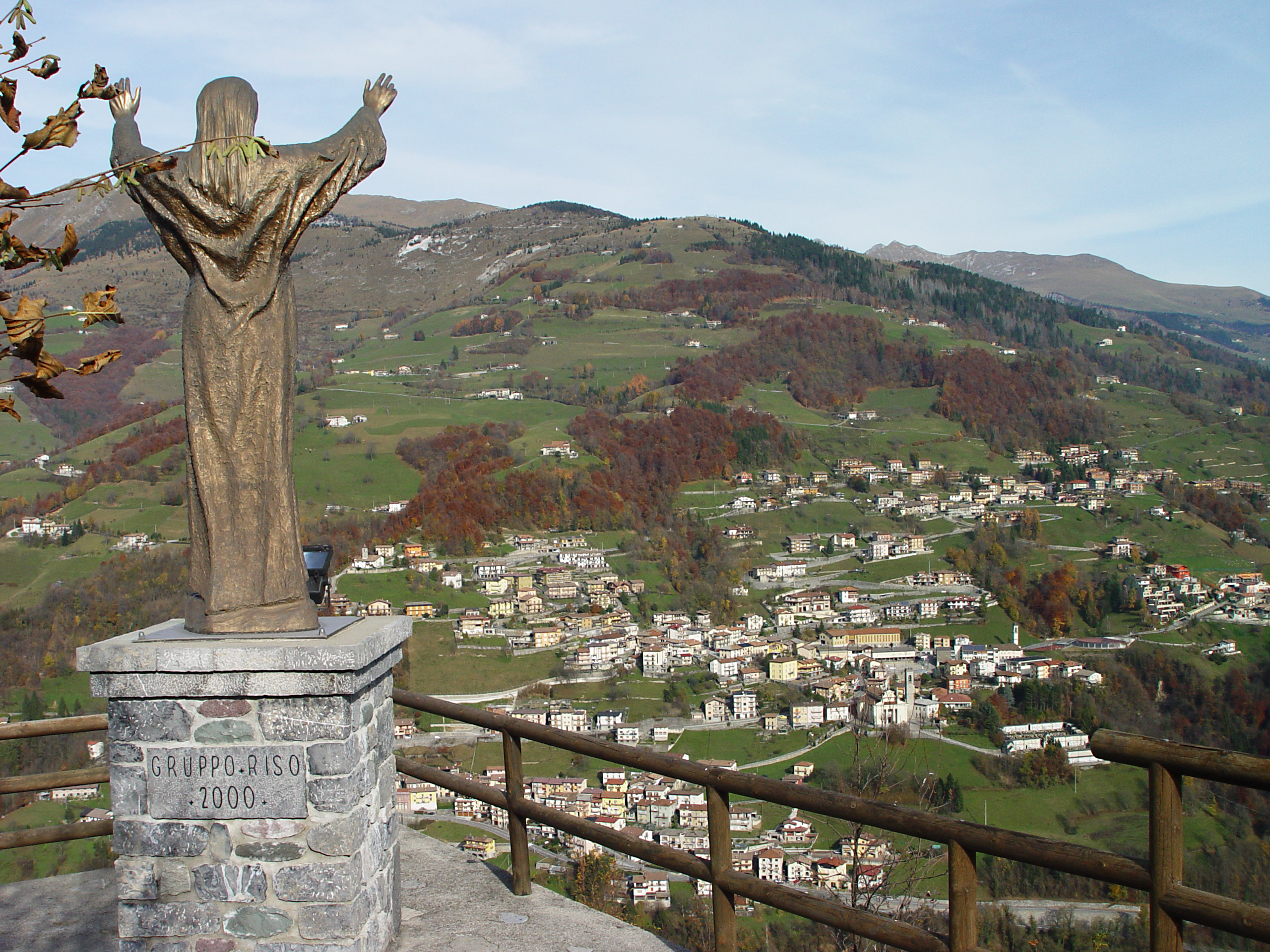 La statua del Cristo Re sulla Costa del Falò con vista panoramica del comune di Gorno (BG)